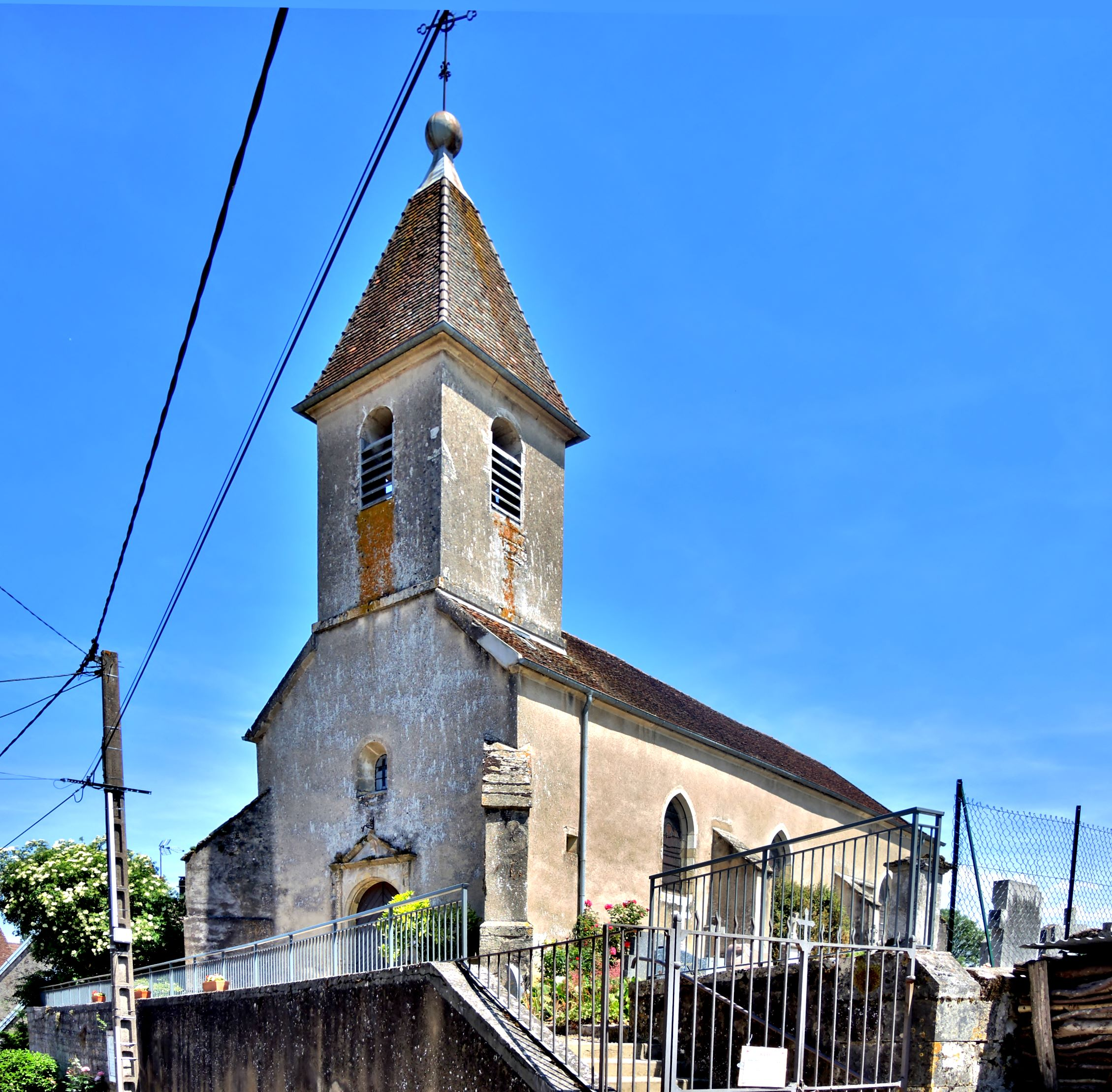 Eglise Notre-Dame du mont Guérin, à Marpain. Dammartin-Marpain. Jura